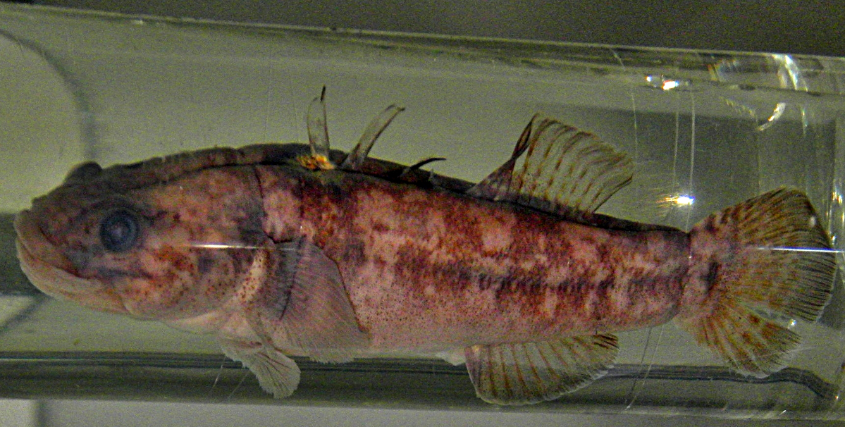 Chaenogobius annularis — кольчатый дальневосточный бычок